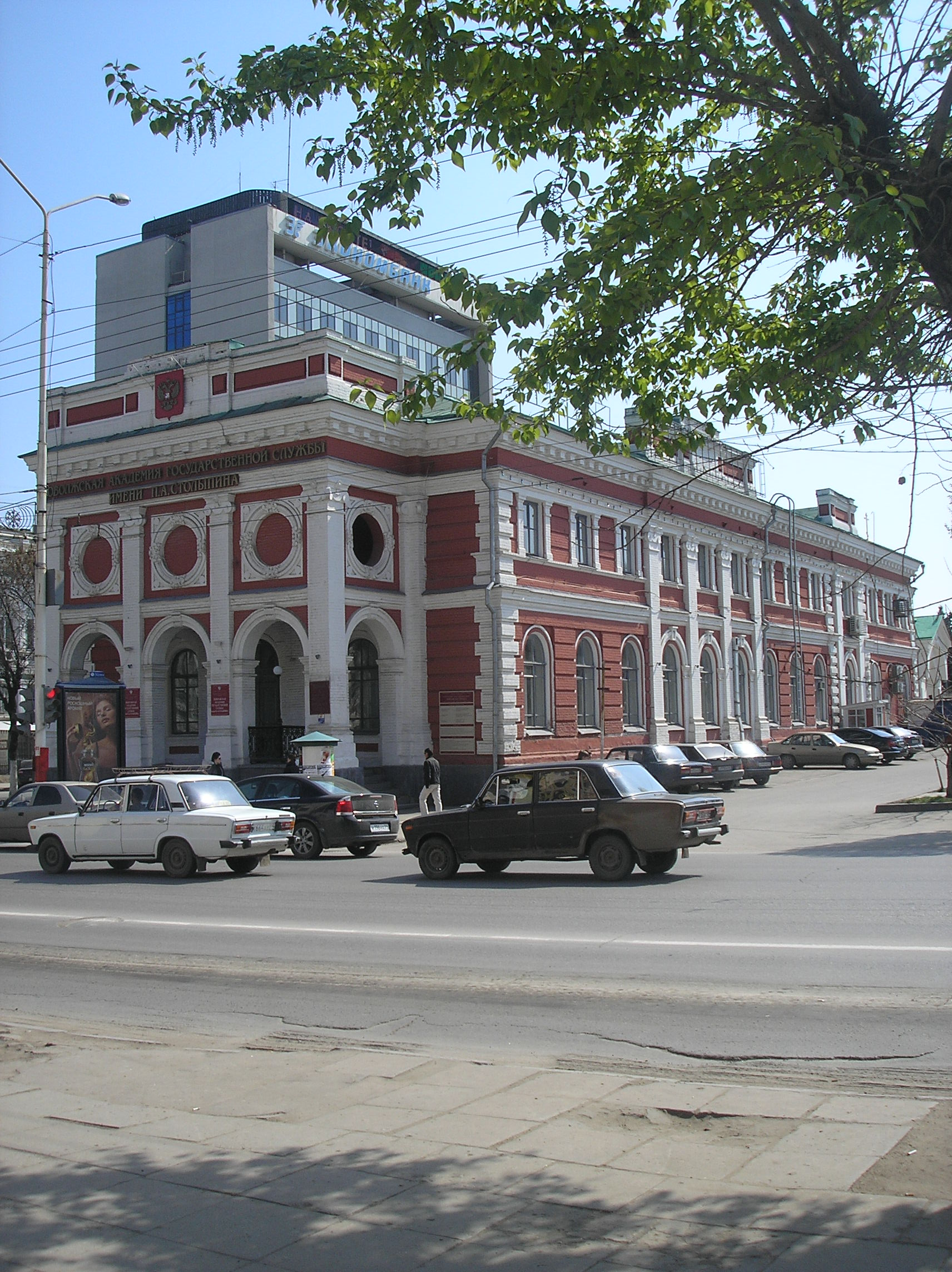 Поволжская Академия Государственной Службы, Саратов